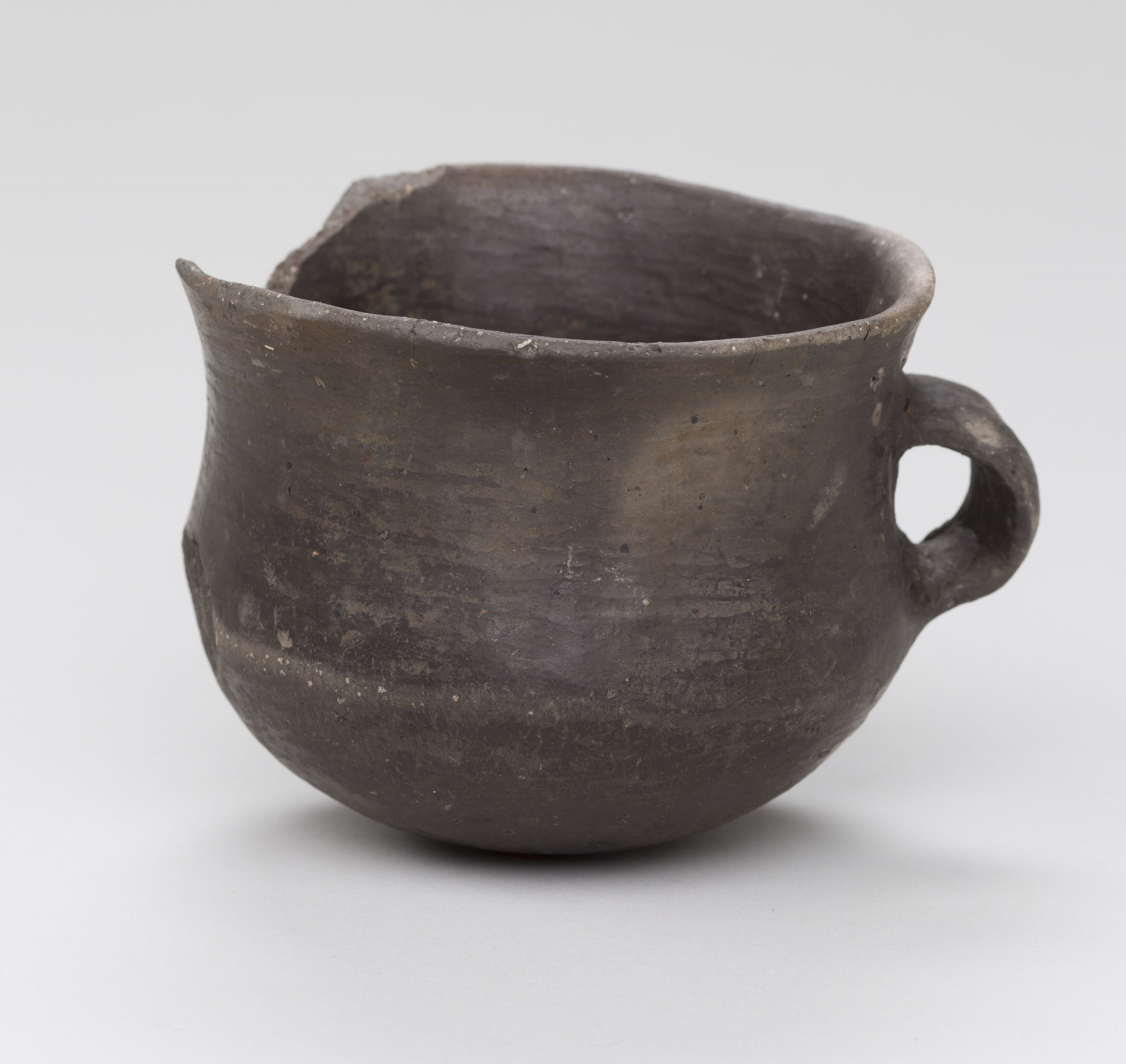 Bildarchiv der Kantonsarchäologie Aargau Archiv Nr. Col./Dig.: 094087 Objekt: Tasse, Frühbronzezeit Fundort: Beinwil am See, Ägelmoos Aufnahmedatum: 2000 Beschreibung: Die kleine Tasse diente wahrscheinlich als Trinkgefäss. Für welche Flüssigkeiten bleibt unbekannt. Mäglich wären unter anderem Bier oder Milch. Datierung: Frühbronzezeit, ca. 1650 v. Chr. Ausstellungsort: Museum Burghalde Lenzburg Ausgrabung: Die flächige Unterwasser-Untersuchung hatte zum Ziel, vertiefte Informationen über Art und Erhaltungszustand sowie über die Erosionsgefährdung der Fundstelle zu erhalten. Die Uferplatte wurde grossflächig inspiziert bis und mit der Abbruchkante und der Haldenoberkante. Auf Eingriffe in den Untergrund wurde grösstenteils verzichtet, dafür die Oberfläche relativ grossflächig abgewedelt und erfasst: viele liegende Hölzer, die an der Oberkante z.T aus der Halde herausragten; Bergung der Keramikfragmente; Entnahme von Dendroproben.